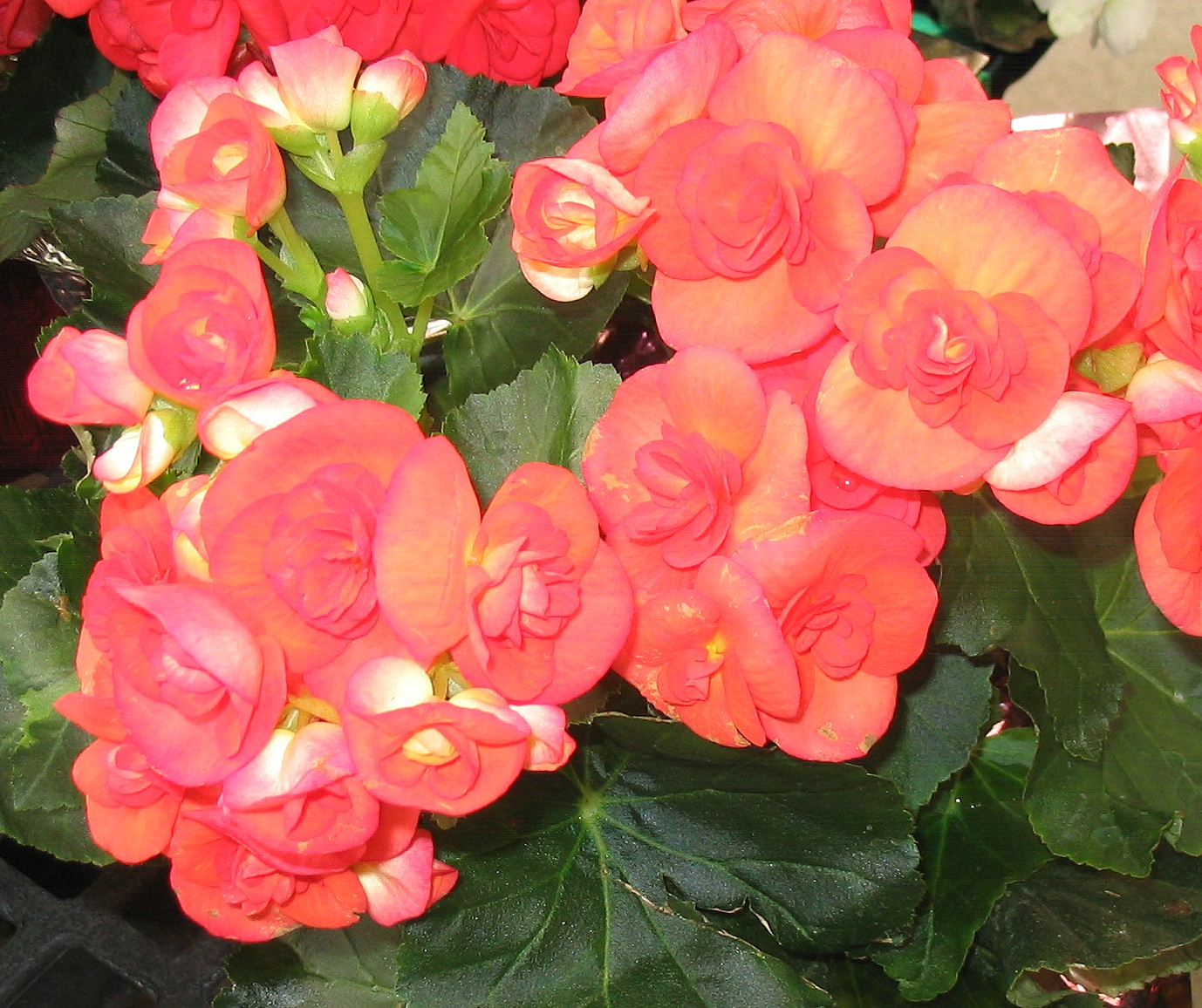 Begonia-Elatior-Hybrid A Begonia cultivar.